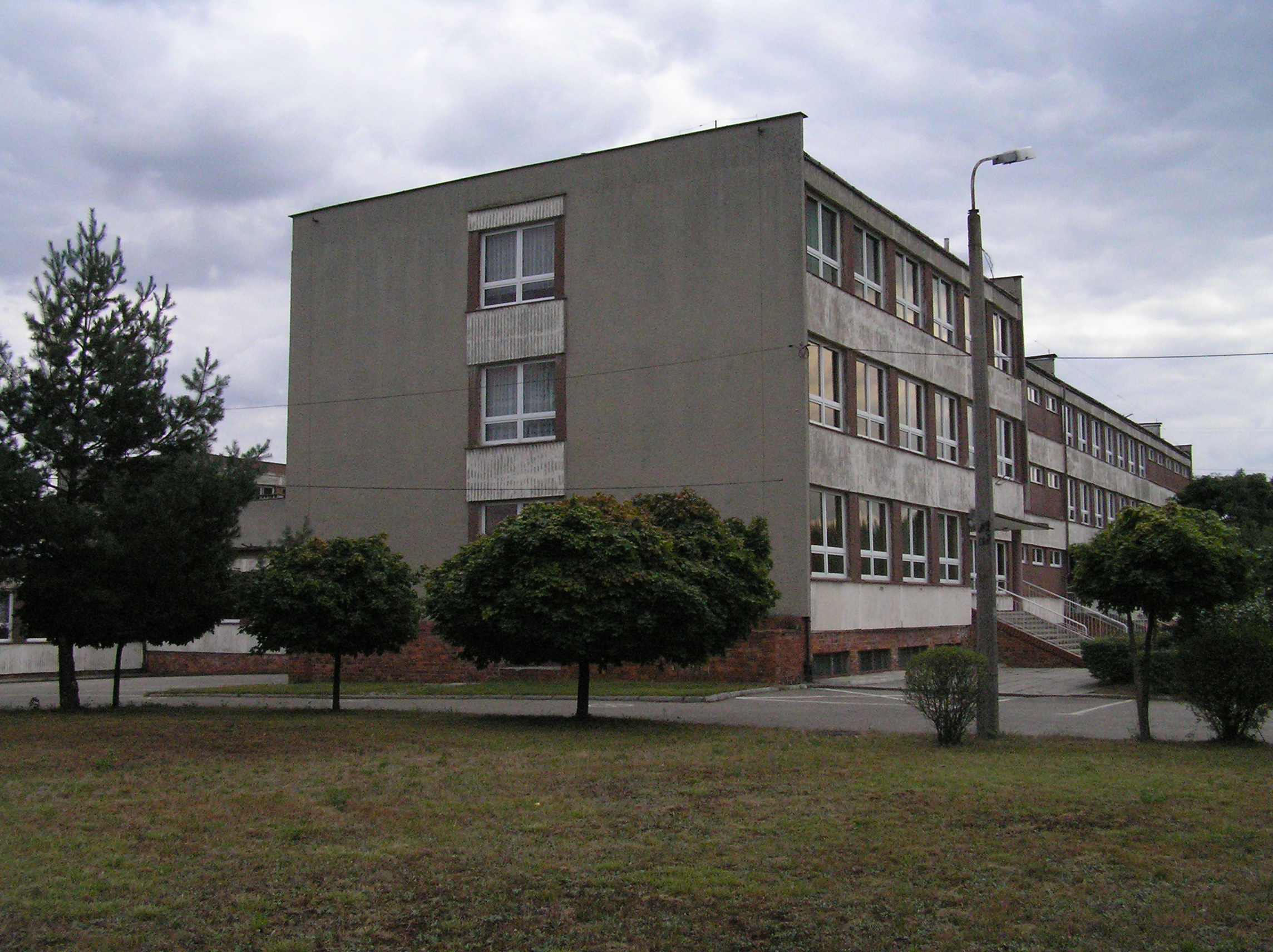 Szkoła Policealna Województwa Śląskiego imienia dr Feliksa Białego w Orzepowicach, dzielnicy Rybnika